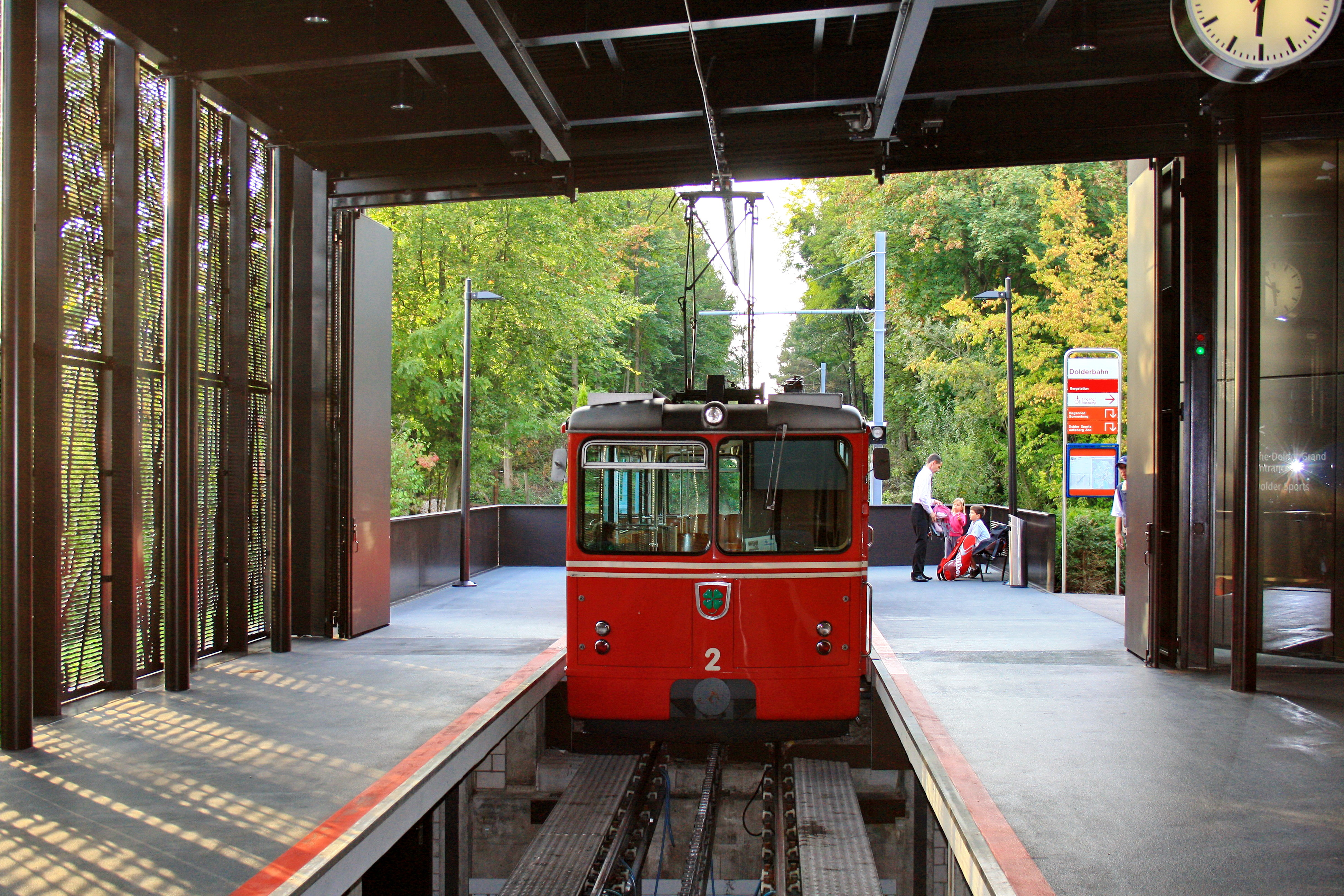 Dolderbahn tram No. 2 at Grand Hotel Dolder station